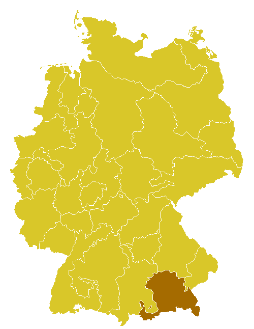 Beschreibung: Katholische Diözese/Bistum in Deutschland